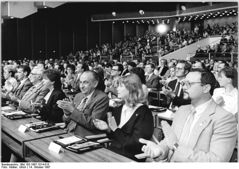 ADN-ZB Häßler-14.10.87-kb-Dresden: 16. Parteitag der CDU - Im Kulturpalast der Elbemetropole begann der CDU-Parteitag. 1 330 Delegierte ziehen Bilanz der bisherigen Tätigkeit der Partei und beraten über ihren spezifischen Beitrag zur weiteren Gestaltung der entwickelten sozialistischen Gesellschaft in der DDR.